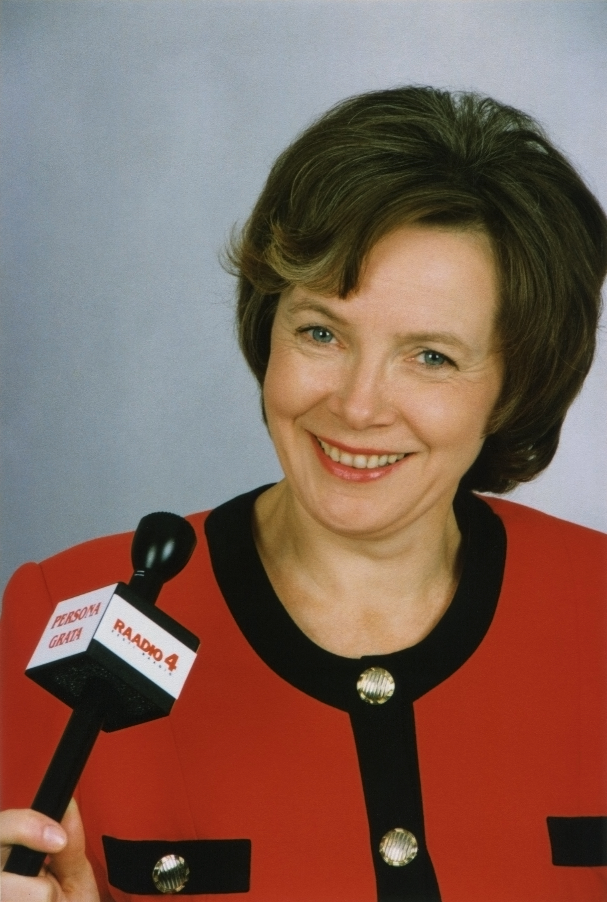 Tooni Tonto, Eesti raadioajakirjanik